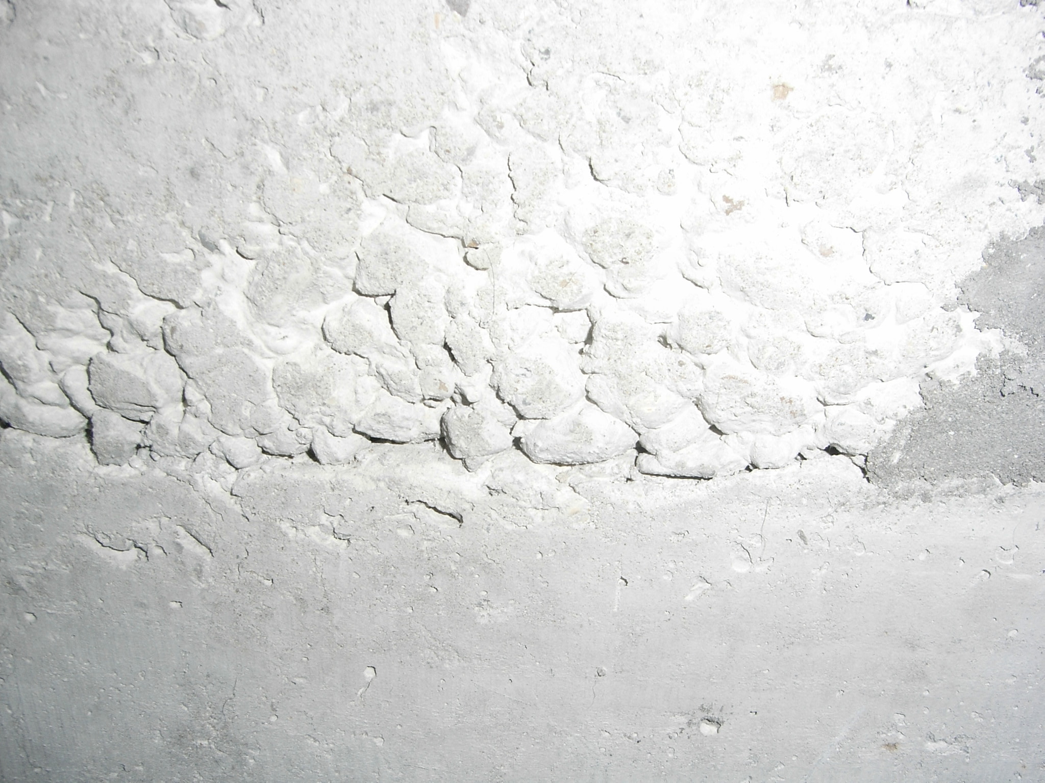 Ségrégation du béton (béton armé).